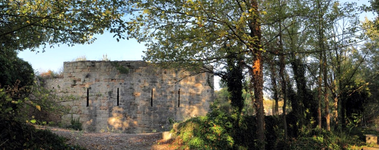 Els Molins de la Vila, al llarg del riu Francolí i els seus afluents en el terme de Montblanc, són del segle XIII i el Molí Gran està en molt bon estat de conservació. Fotografia del Molí Gran emmarcat per la vegetació. Els colors i la llum de primera hora d'un matí de setembre li donen un caràcter molt especial.